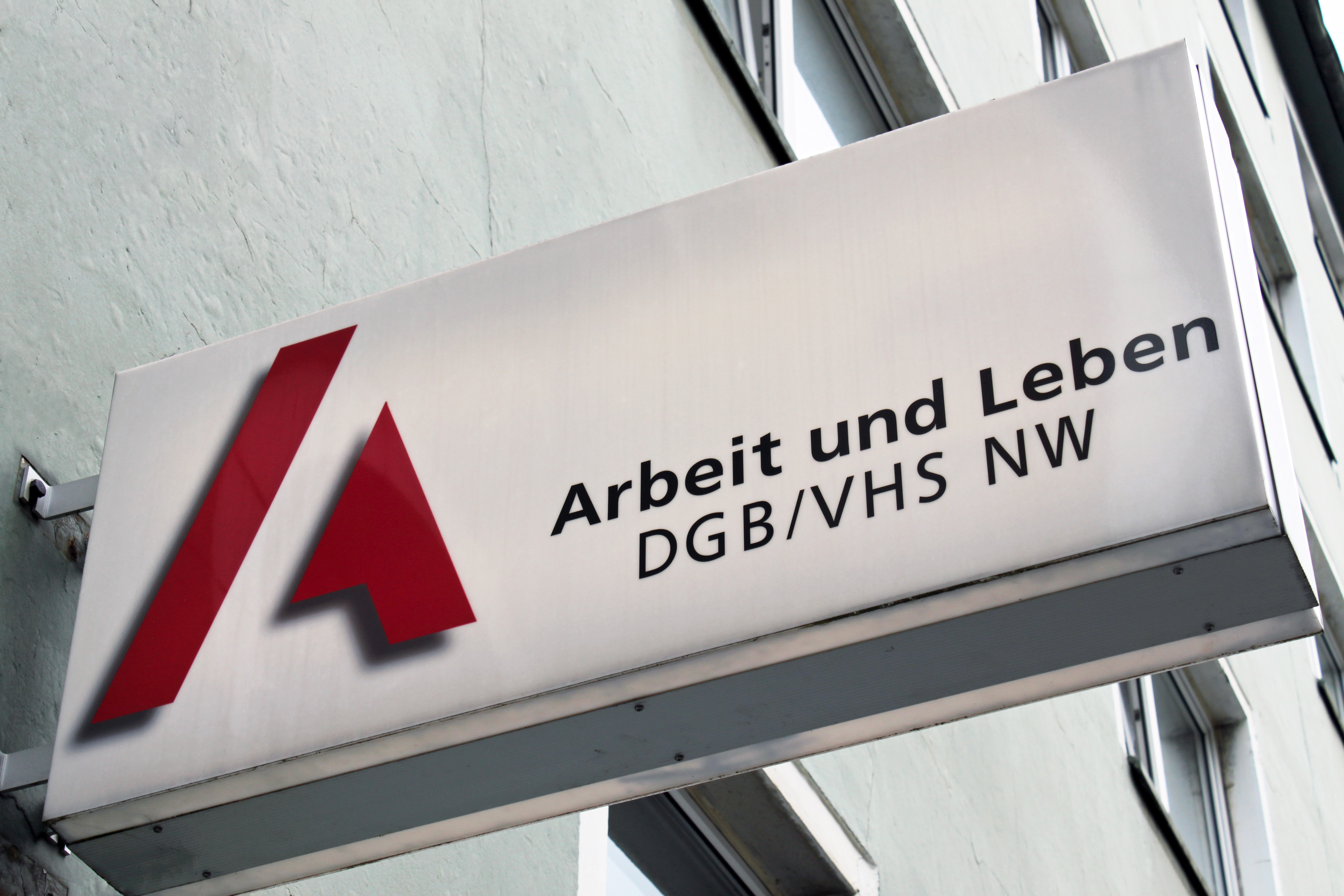 Geschäftsstelle AuL NRW in Düsseldorf